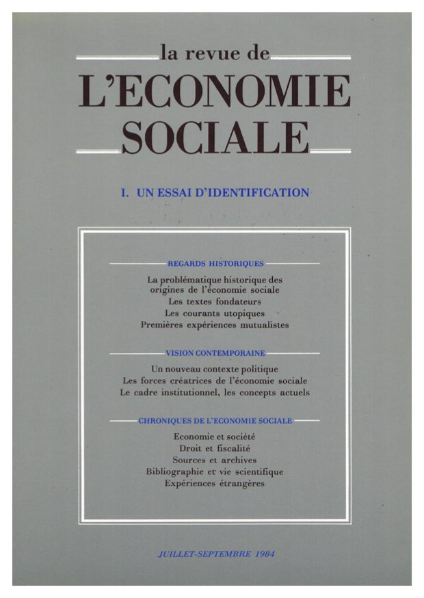 Couverture du n° 1 de la revue de l'économie sociale - 1985, Juillet–Septembre 1984